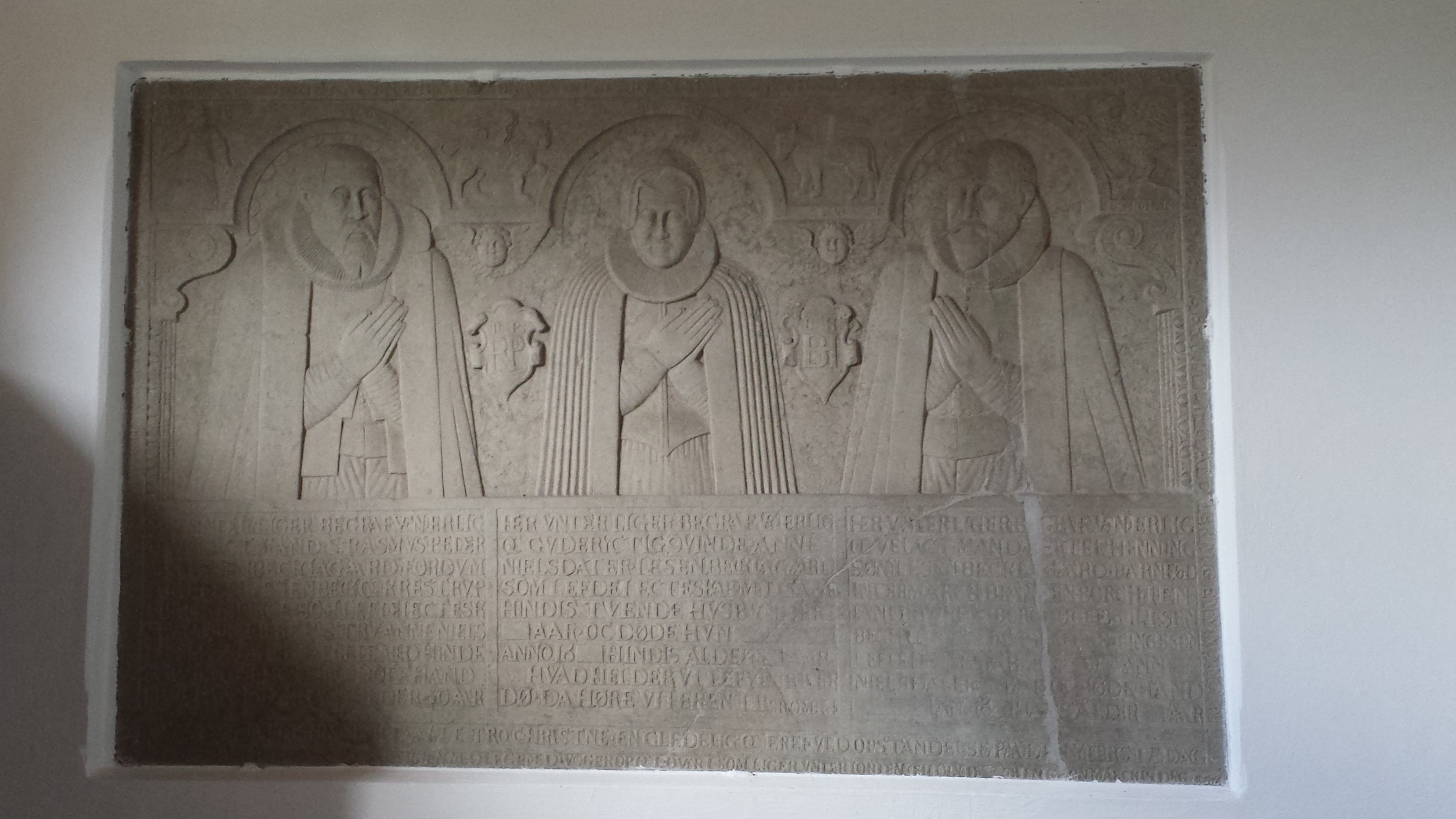 Rasmus Pedersen, birkefoged i Essenbæk og Kristrup til 1602. (tv.) Hans hustru Anna Nielsdatter. (m.) Hendes anden mand Bertel Henningsen, birkefoged i Essenbæk og Kristrup. (th.)